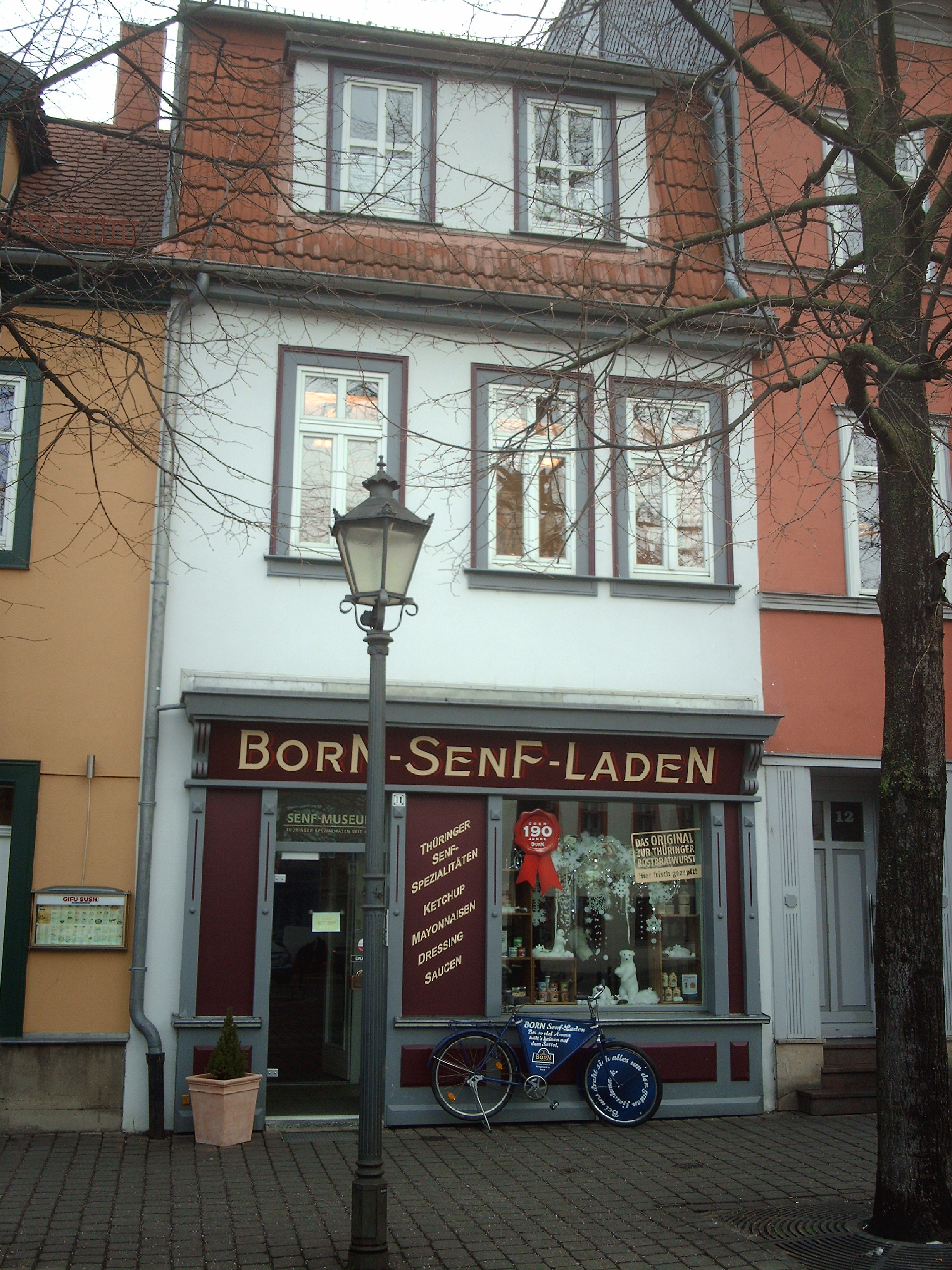 Senf-Museum der Fa. Born (Erfurt, Wenigemarkt 11).